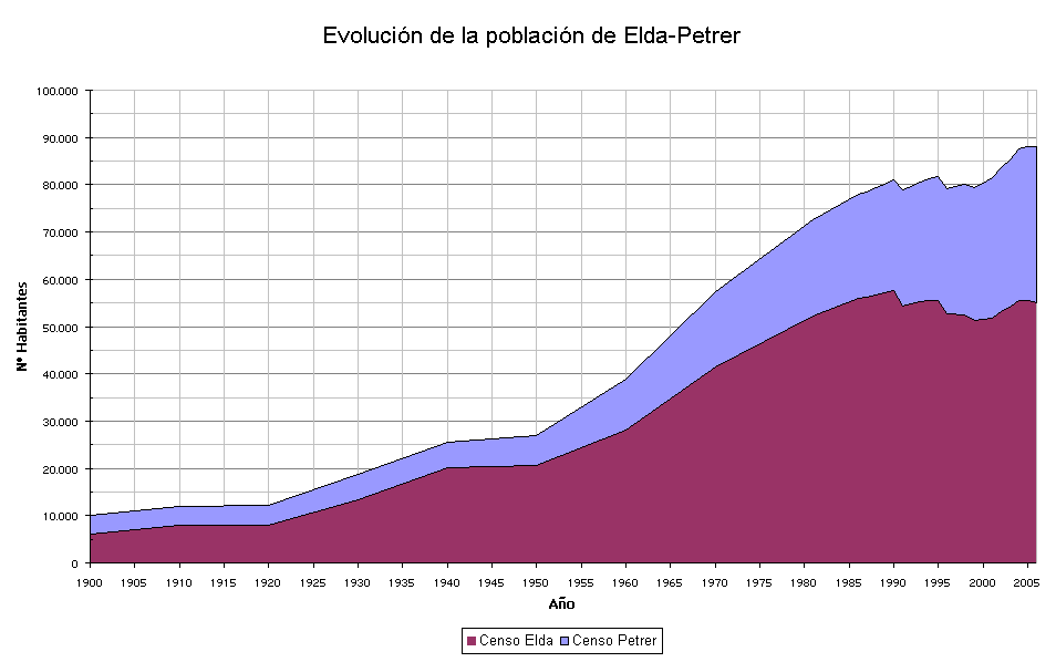 Gráfica de la evolución de la población de Elda-Petrer